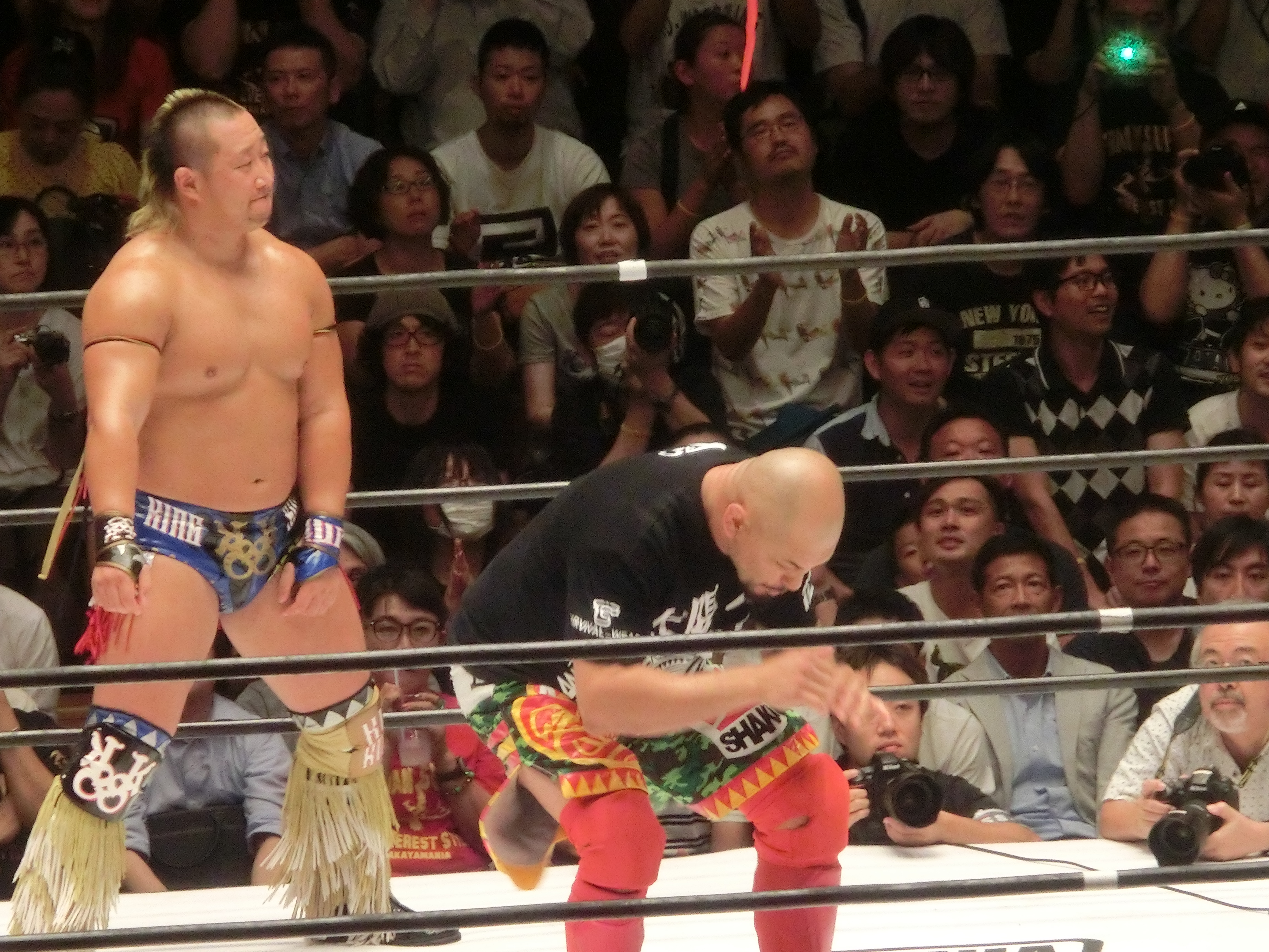 2018年8月31日、後楽園ホール